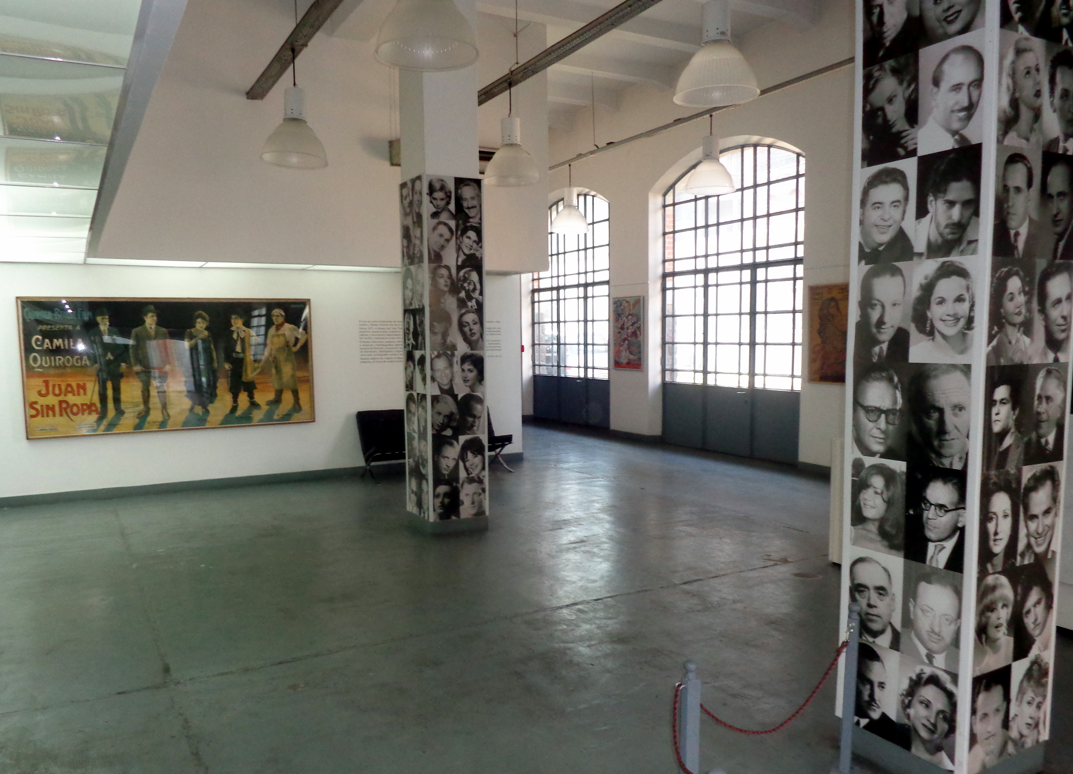 museo Museo del Cine Pablo Ducrós Hicken, en el barrio de la Boca, Buenos Aires, Argentina.